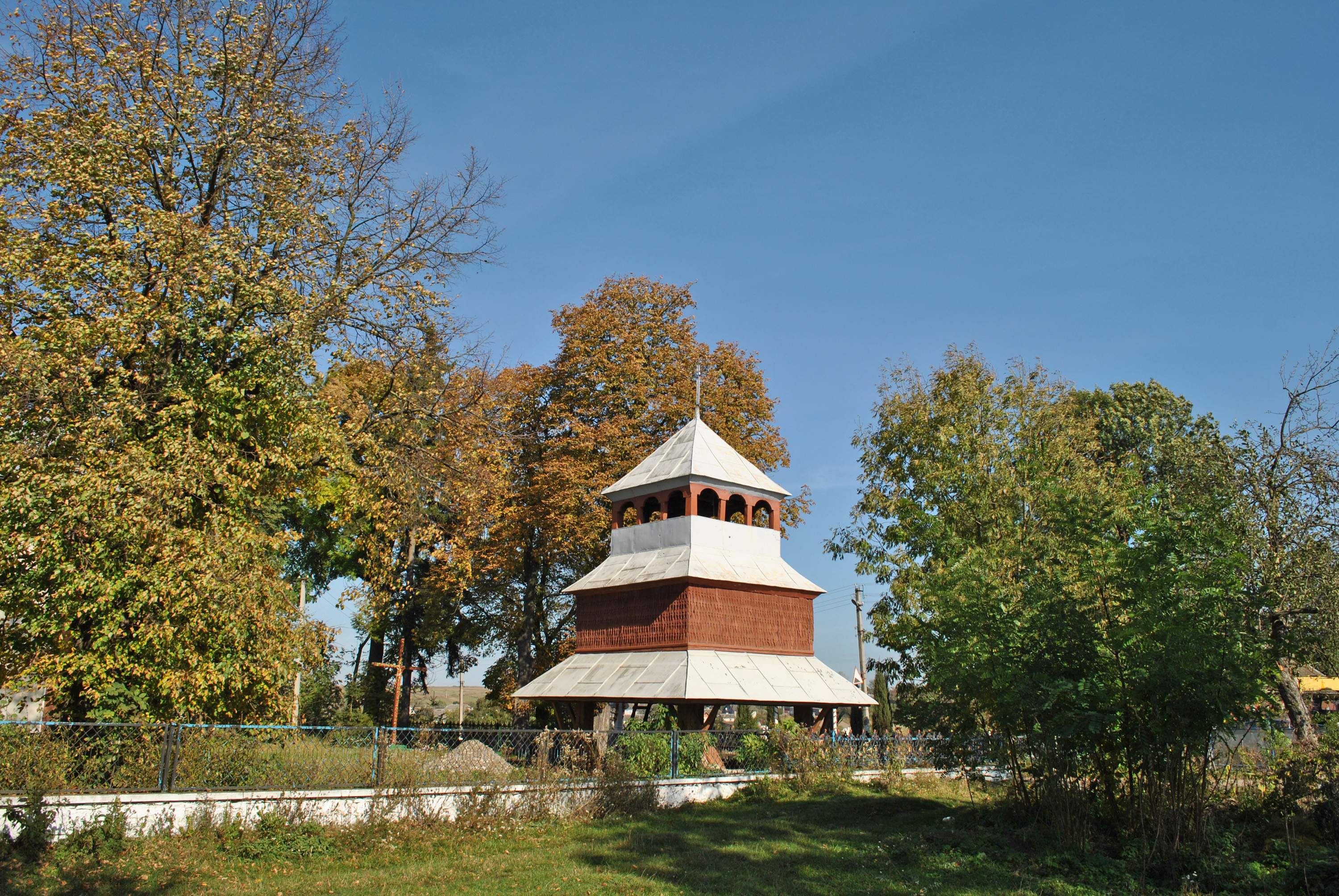 Дзвіниця Святодухівської церкви (дер.) у селі Білявинці Бучацького району Тернопільської області.